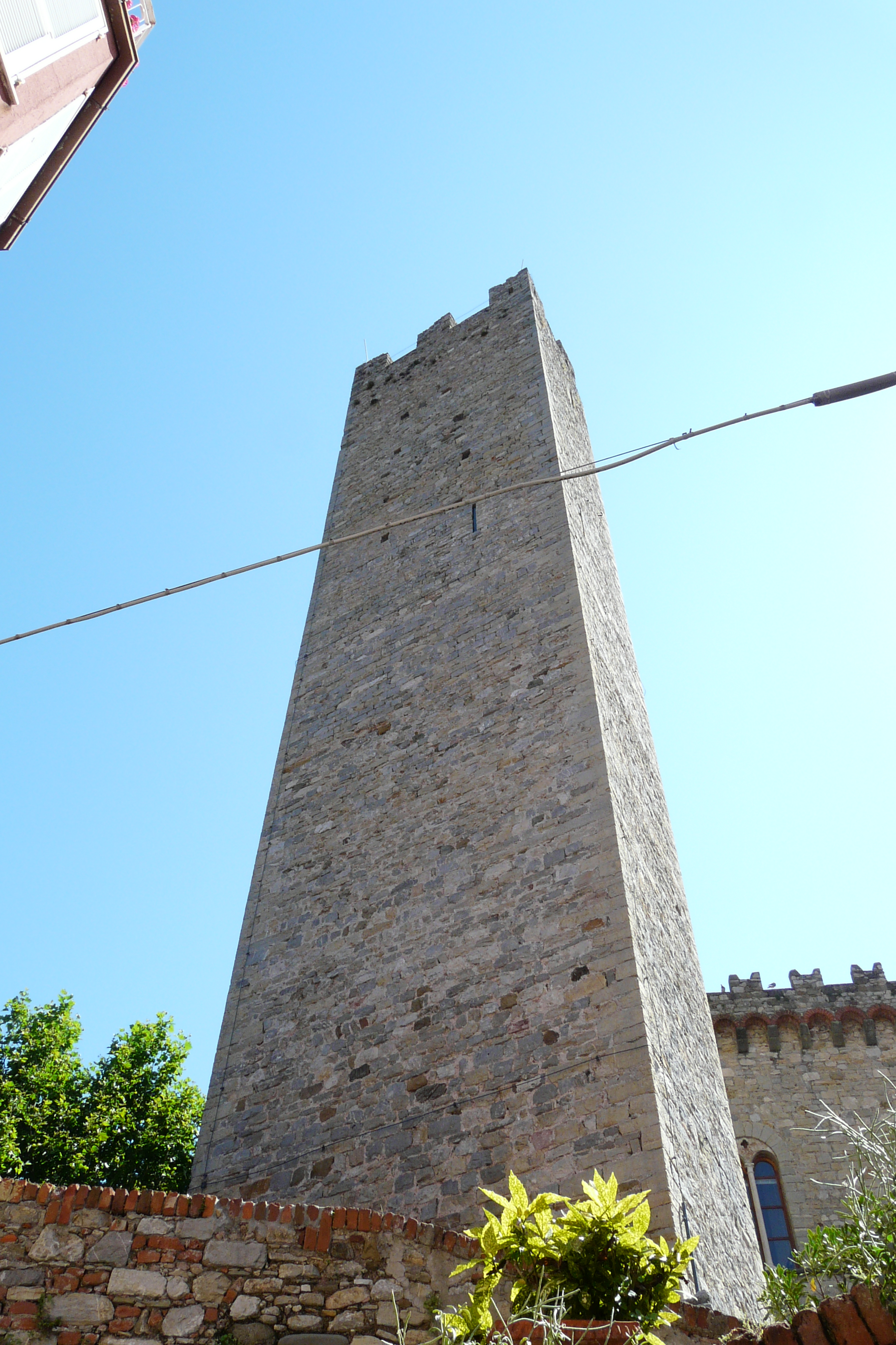 Torre medievale di Arcola, Liguria, Italia